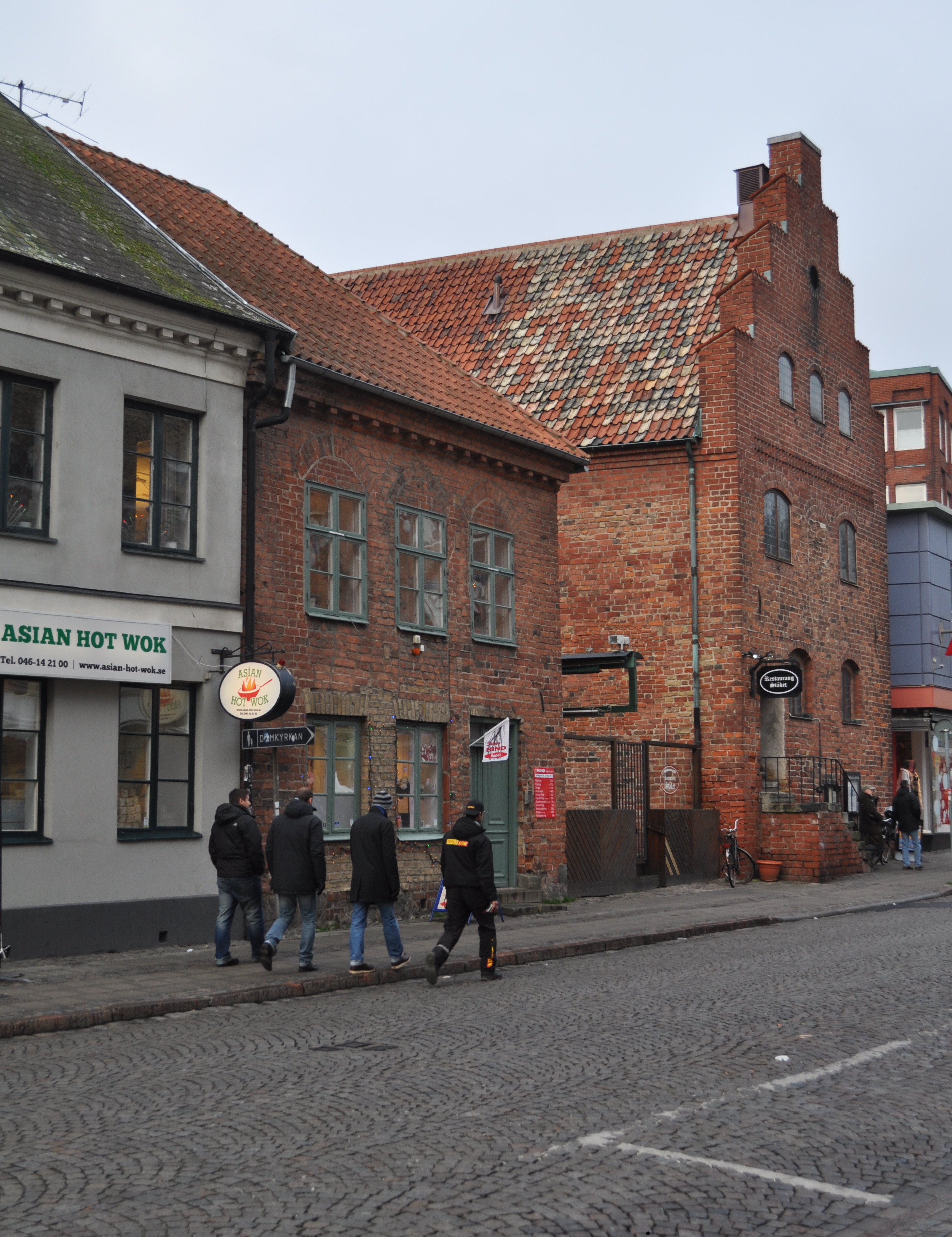 Fru Görvels hus (Färgaren 27) i centrala Lund, Stäket syns i bakgrunden.